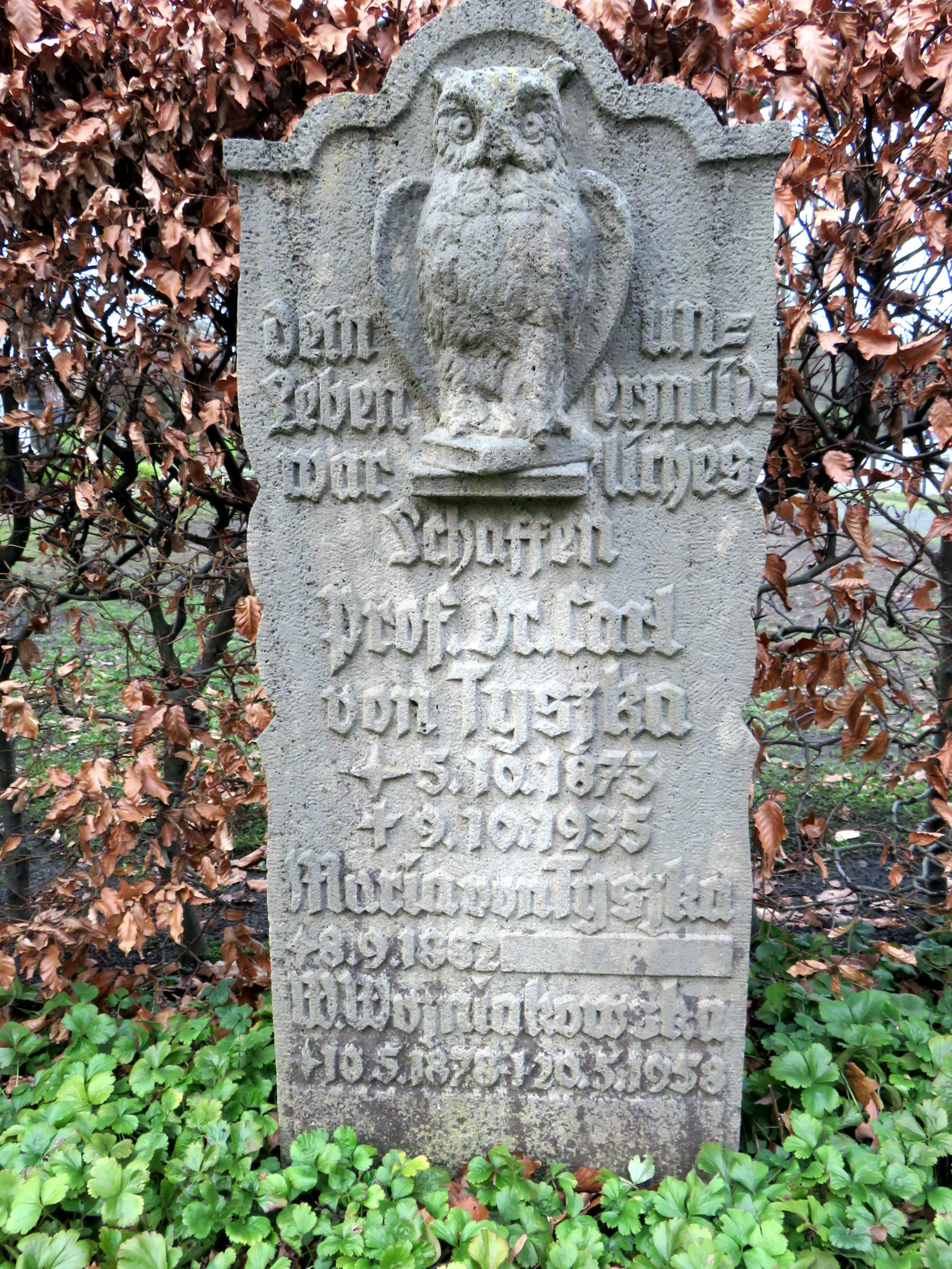 Grabmal für den deutschen Finanzwissenschaftler Carl von Tyszka (1873 – 1935) am Museum auf dem Hamburger Friedhof Ohlsdorf, Inschrift bei .